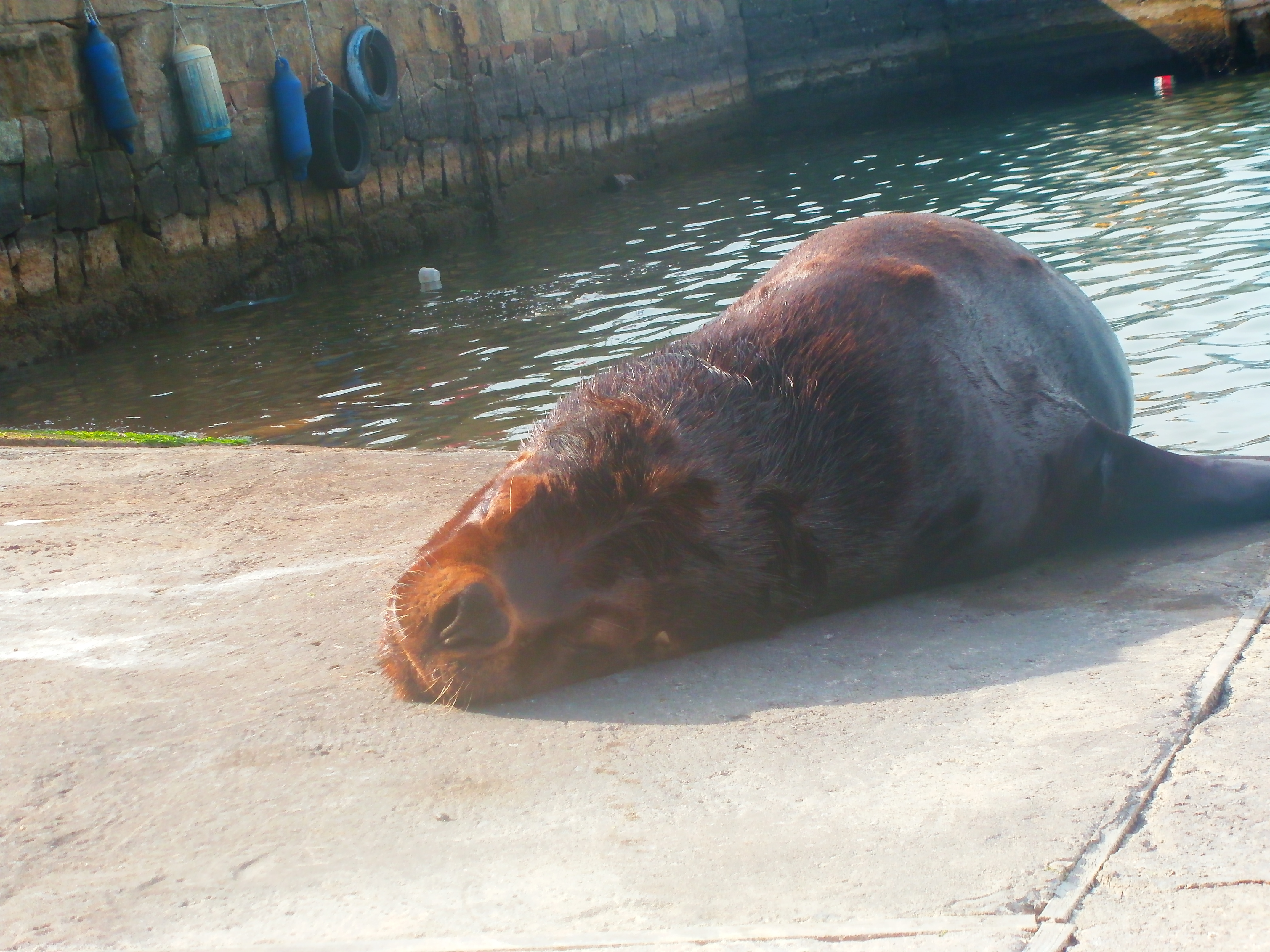 Lobo marino Puerto Punta del Este